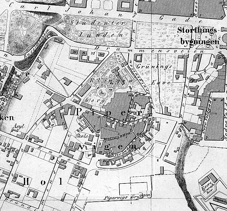 Kart over Vika (Pipervika), 1861.